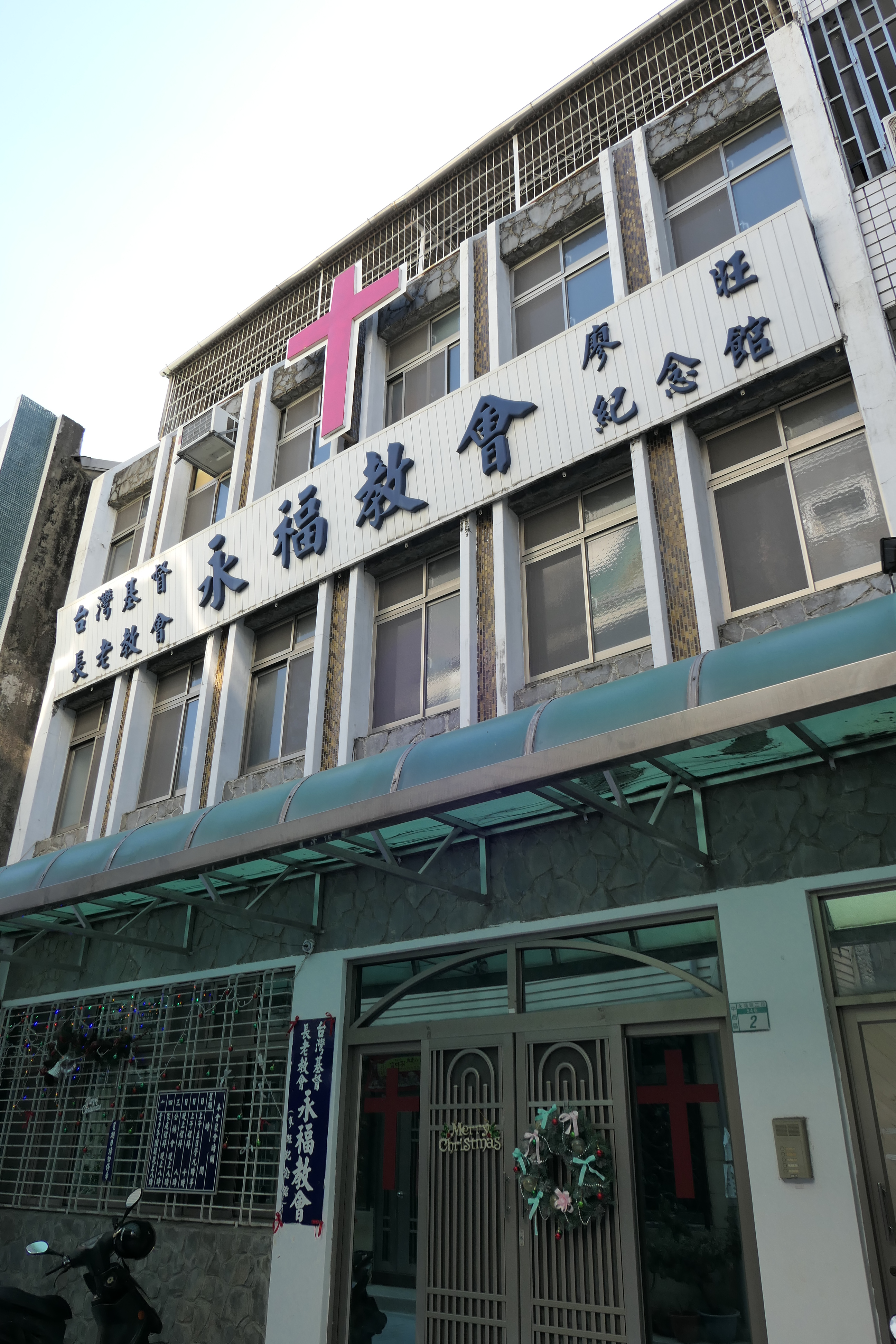 臺灣基督長老教會永福教會兼廖旺紀念館，地址：臺南市中西區永福路二段54巷2號。